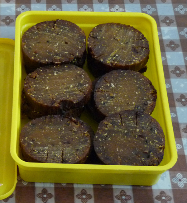 തെണ്ട് കഷണങ്ങളാക്കി മുറിച്ചു വച്ചിരിക്കുന്നു.